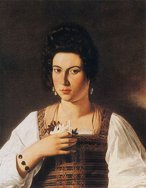 Brustbild einer jungen Frau